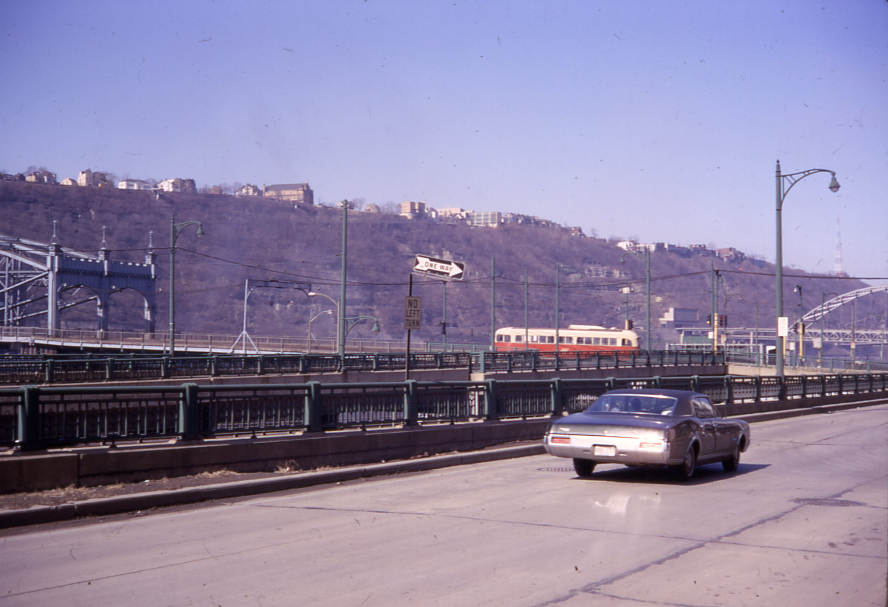 19680330 23 PAT 1640 Smithfield St. @ Ft. Pitt Blvd